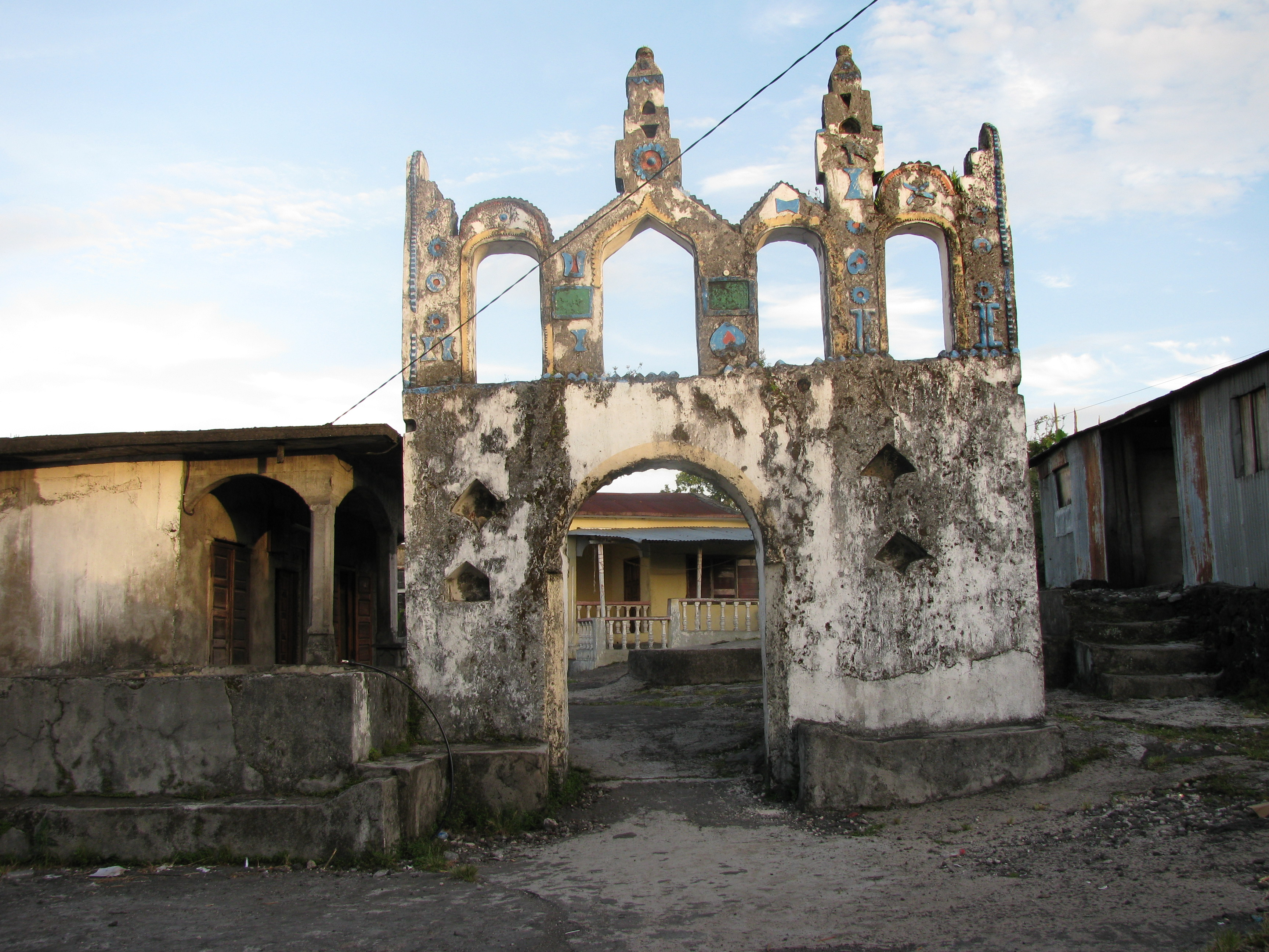 le minaret de chouani (upload : Karim M. )